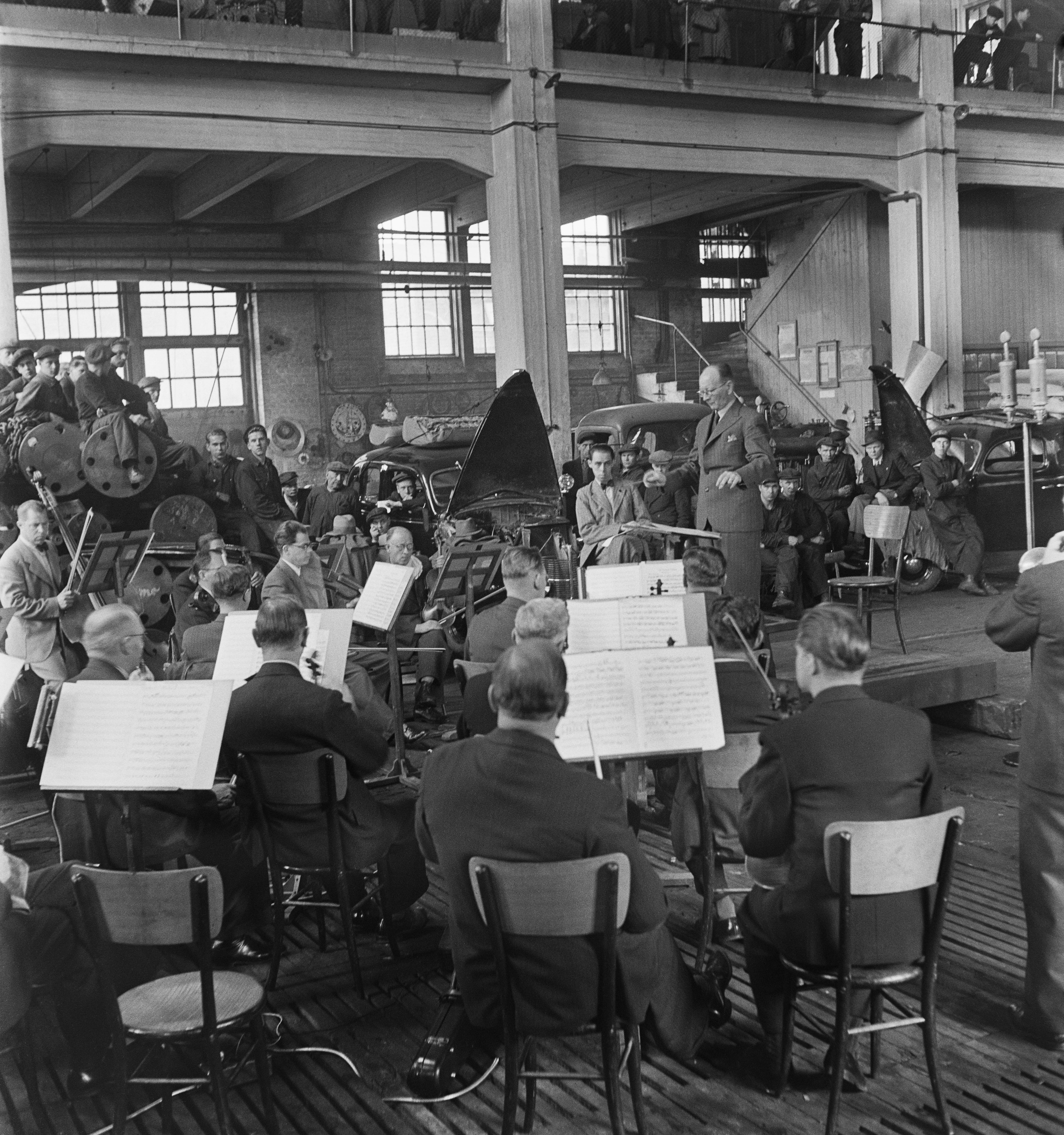 Kapellimestari Toivo Haapanen johtaa Radion sinfoniaorkesterin tehdaskonserttia Hietalahden telakalla Helsingissä. Tiedätkö jotain tästä kuvasta? Jätä kommentti tai ota yhteyttä sähköpostitse: Tutustu Ylen arkistosisältöihin: Fler skatter från Yles arkiv: More about Yle, the Finnish Broadcasting Company